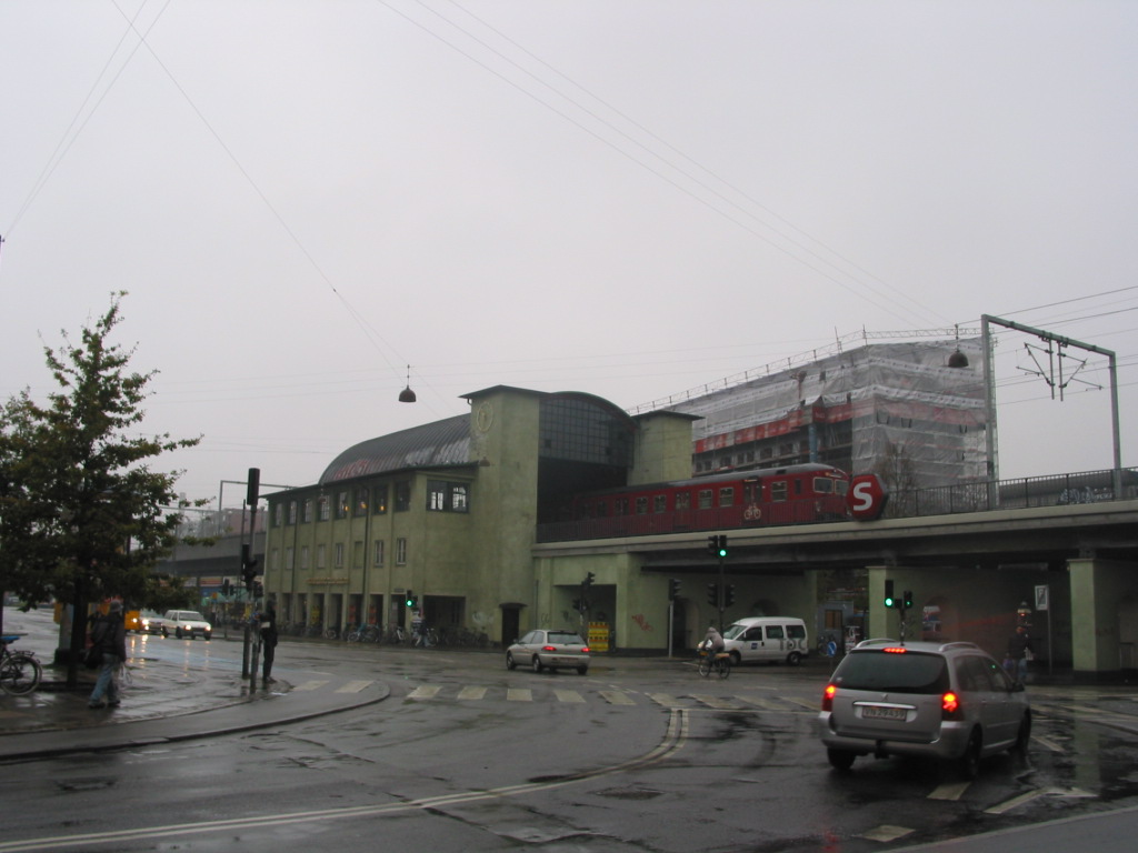 Nørrebro Station i København set fra Føtex